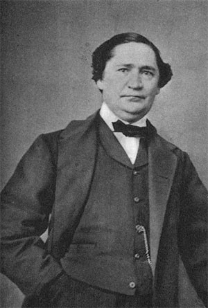 Johan Petter Roos (1818-1882)